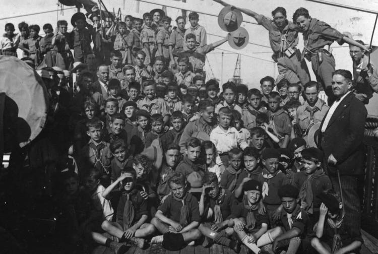 Exploradores de España Elías Ahuja.